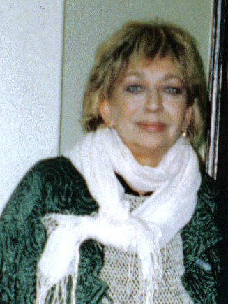 Ewa Szykulska, aktorka.